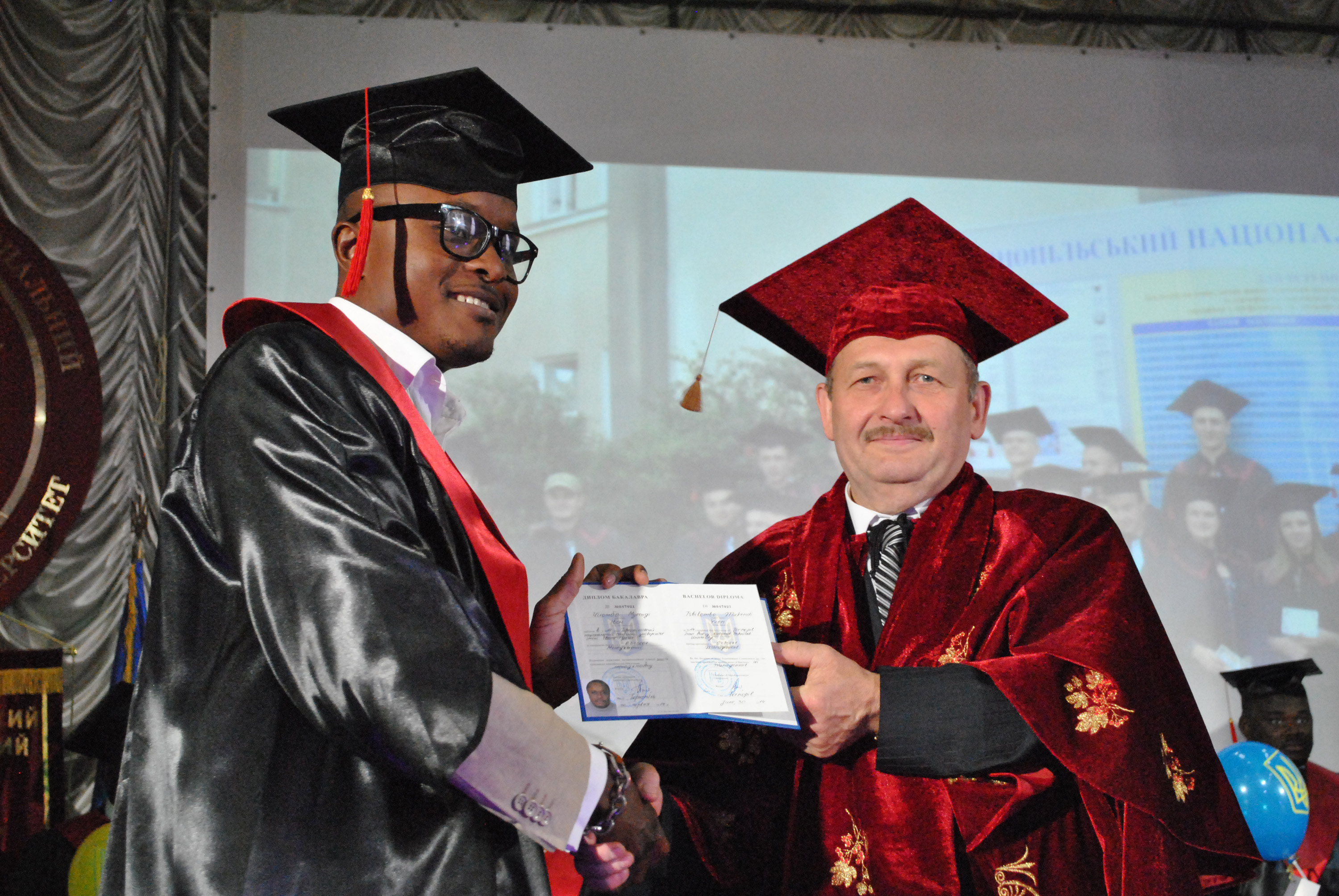 Тернопільський національний технічний університет імені Івана Пулюя. Дипломів випускникам 2014 року вручає ректор Петро Ясній.